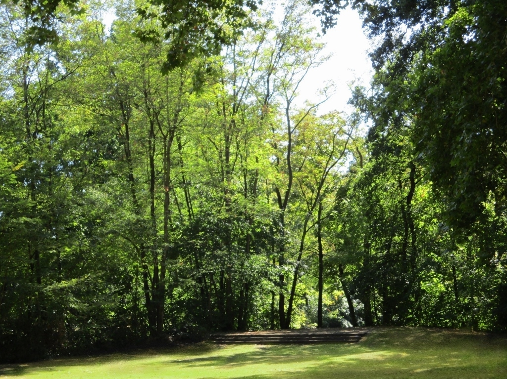 Brentanopark - die historische Freilichtbühne auf der Insel zwischen den beiden Armen der Nidda